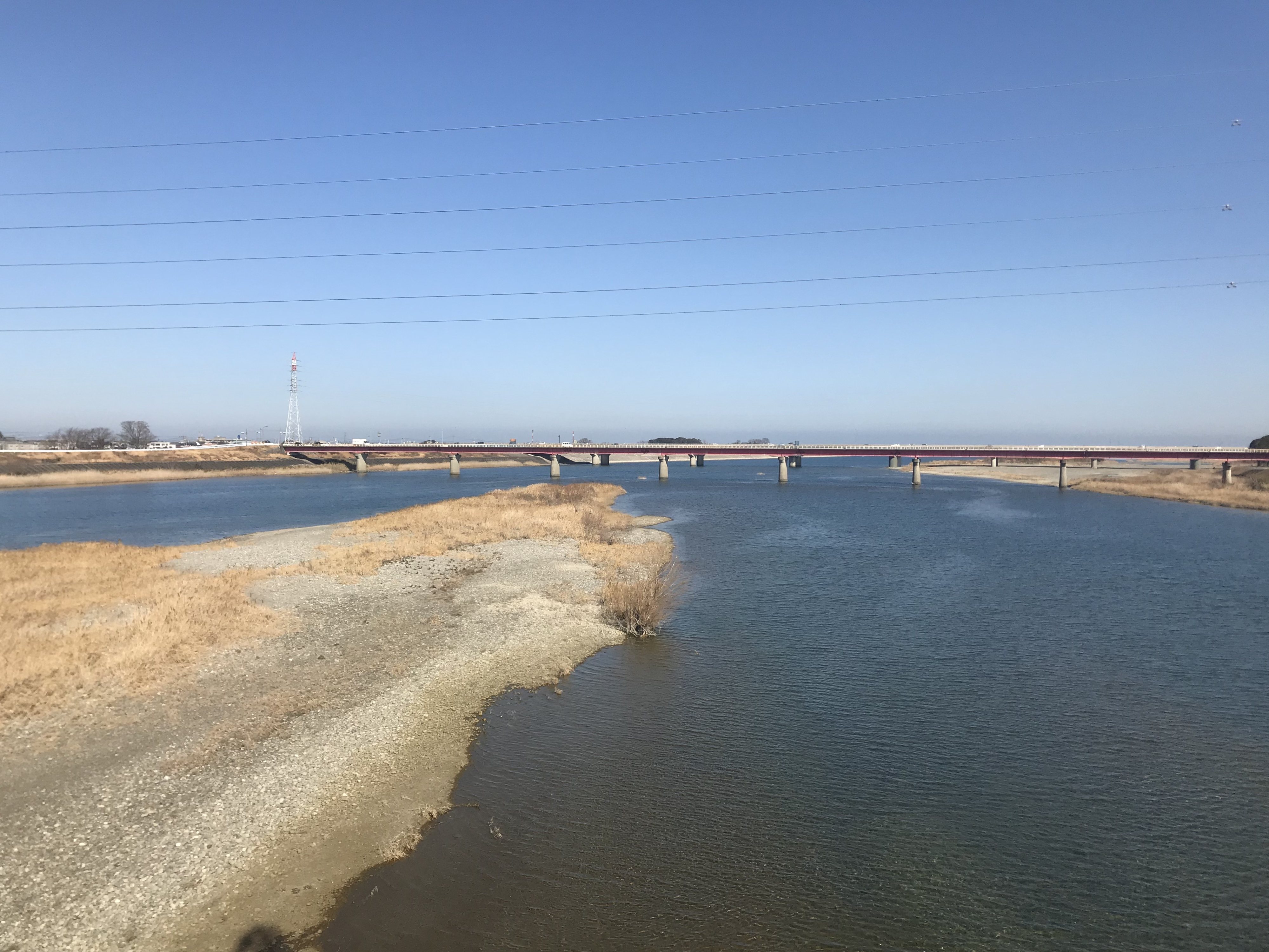 近鉄山田線の列車内より望む宮川